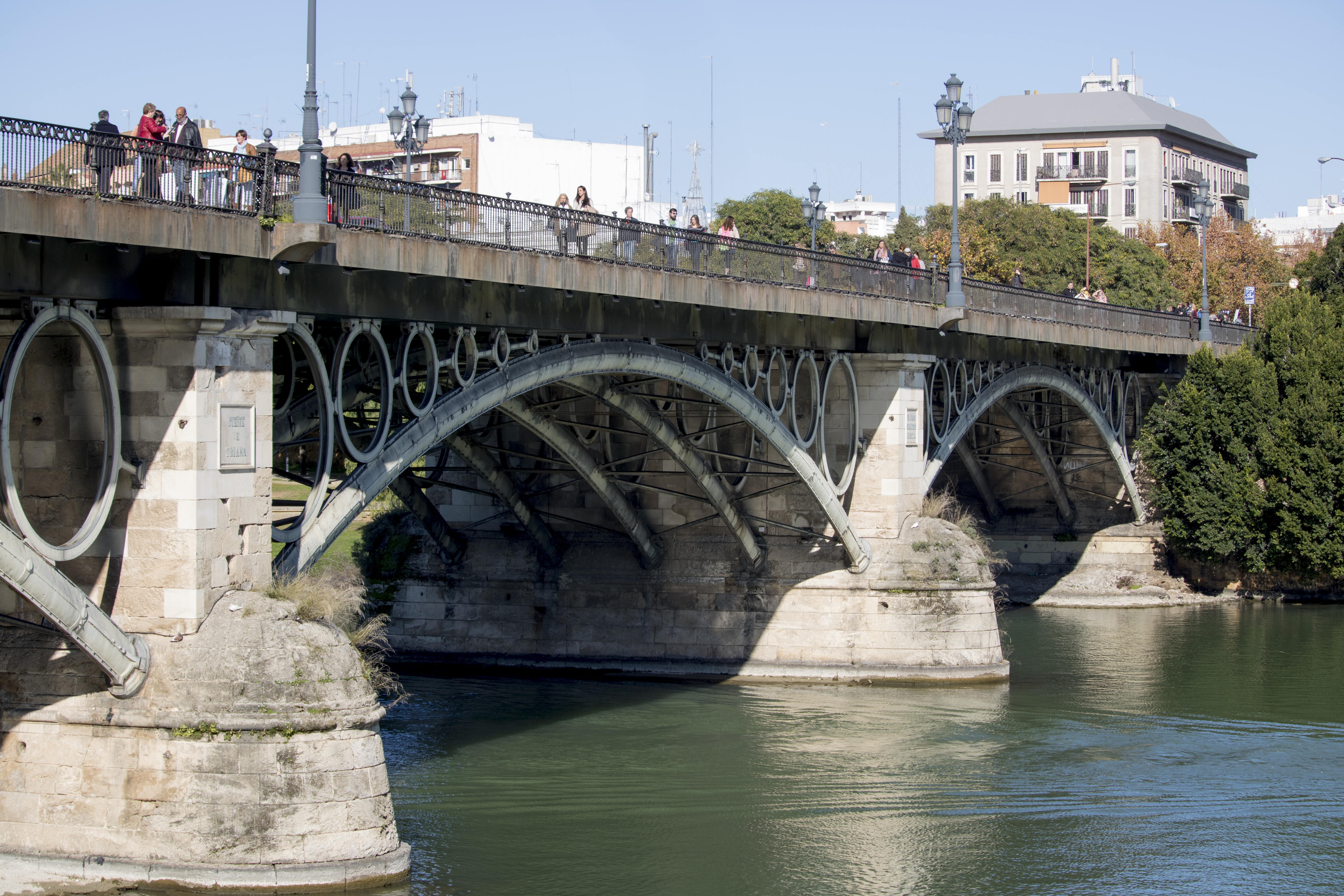 Puente de Triana, Sevilla. Vista contrapicada lateral. Plano general corto